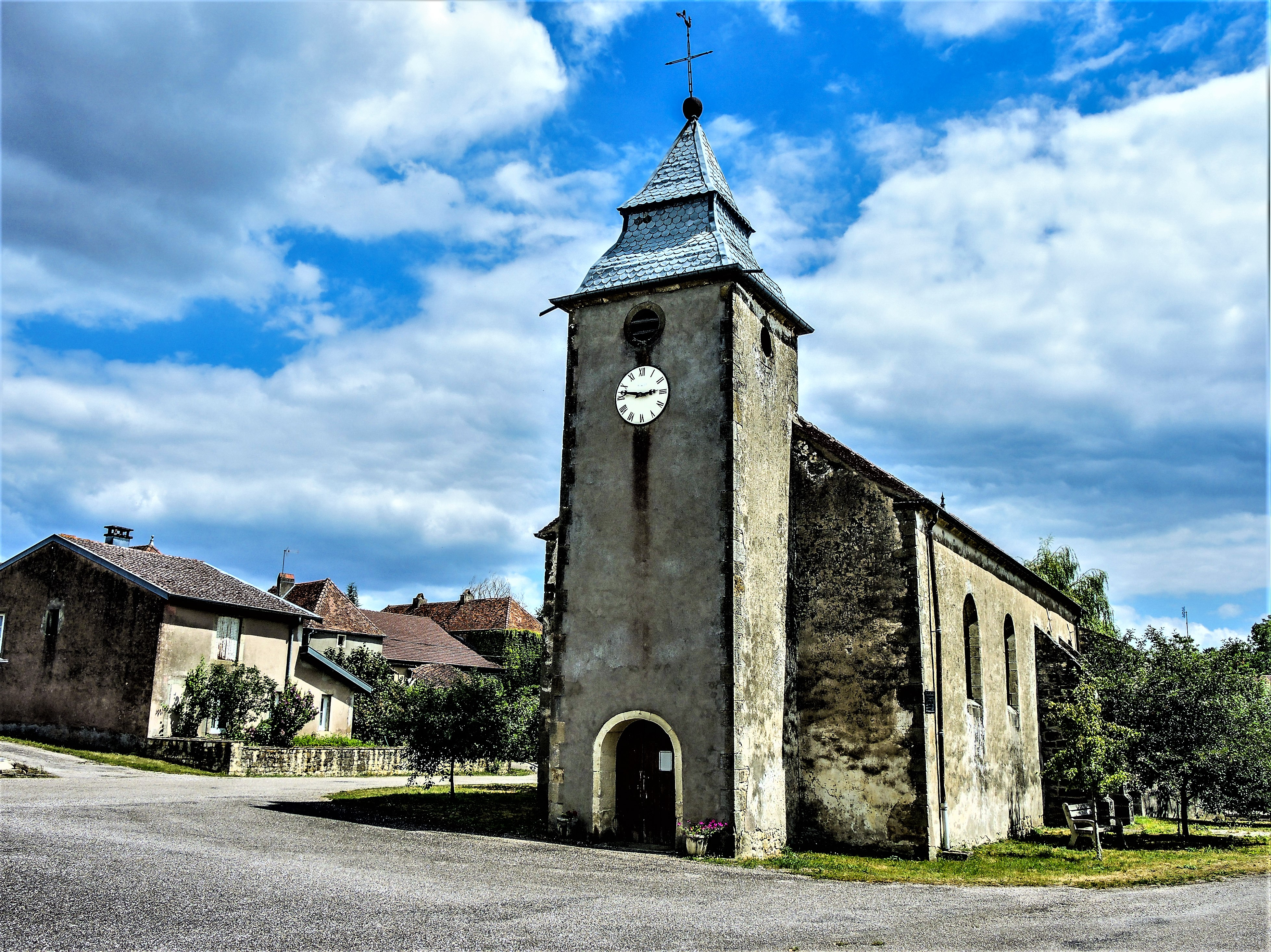 Eglise de Montcourt